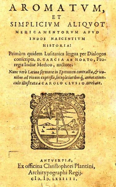 Cover of book by Garcia da Orta (1574) Aromatvm, et simplicivm aliqvot medicamentorvm apvd indos nascentivm historia: Primùm quidem Lusitanica lingua per Dialogos conscripta, / D. Garçia ab Horto, Proregis Indiae Medico, auctore. Nunc verò Latino sermone in Epitomen contracta, & iconibus ad viuum expressis, locupletioribusq[ue] annotatiunculis illustrata à Carolo Clvsio Atrebate